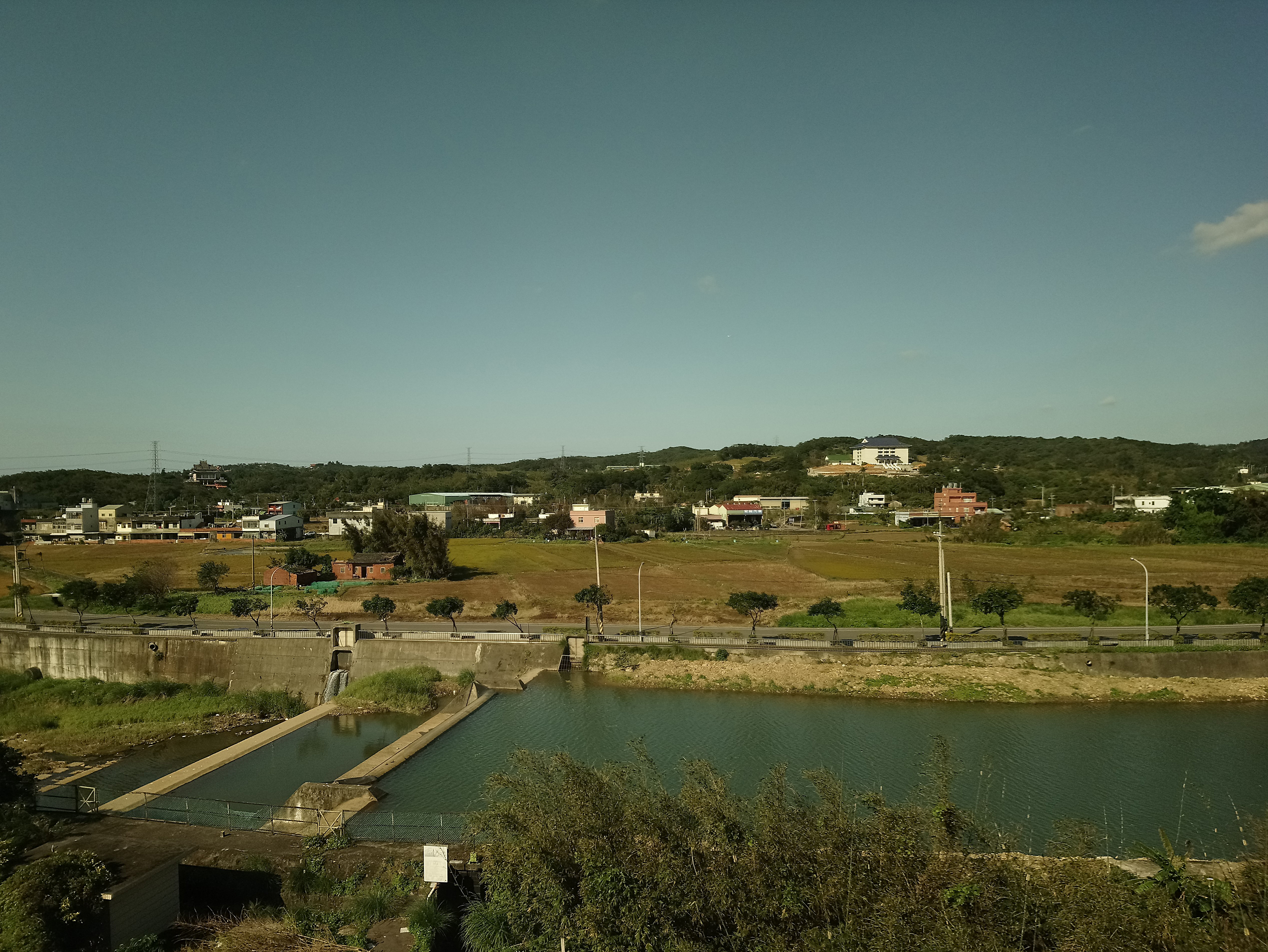 流經坑子外的坑子溪,桃園市蘆竹區南崁地區外社里